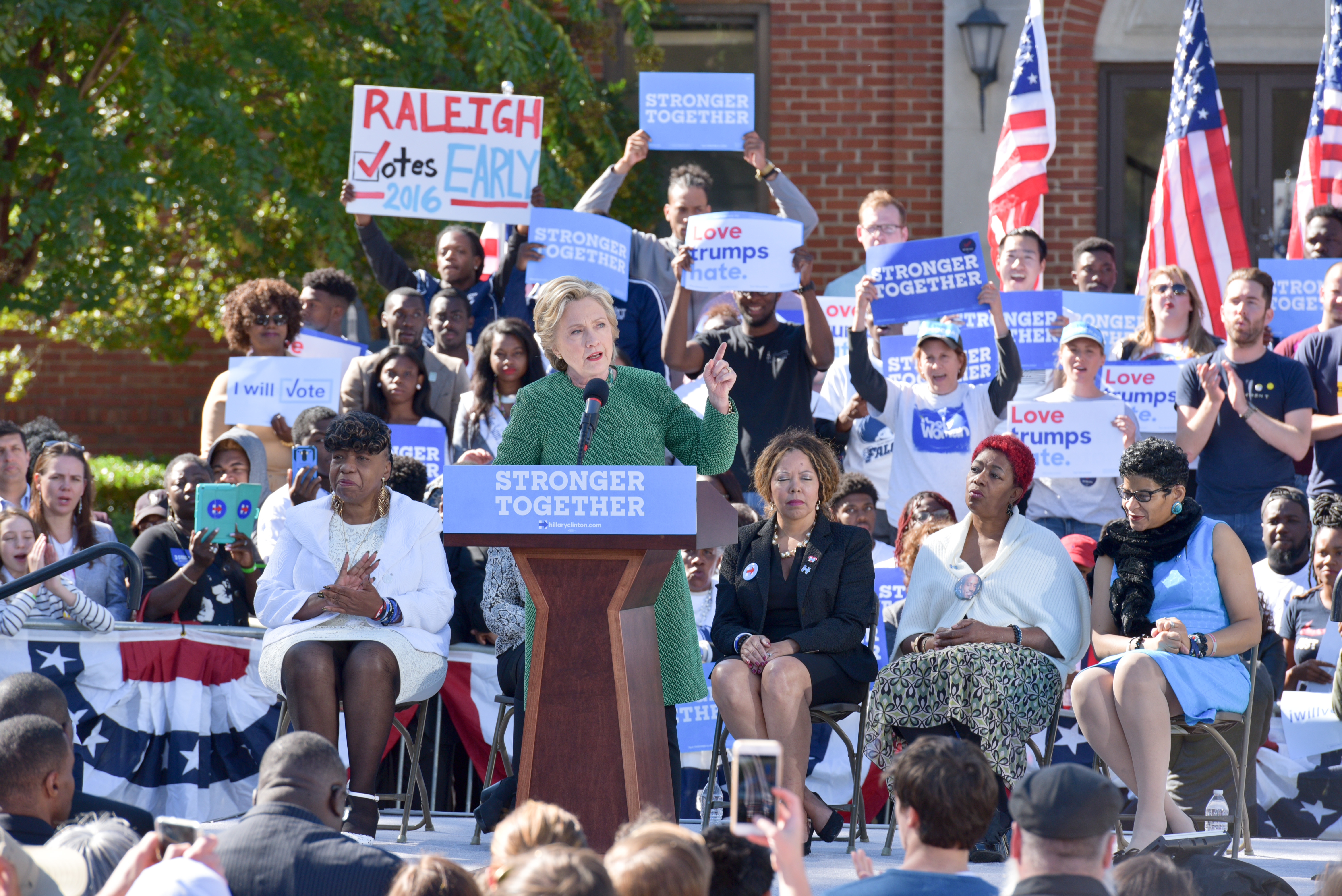 DSC_3998_1